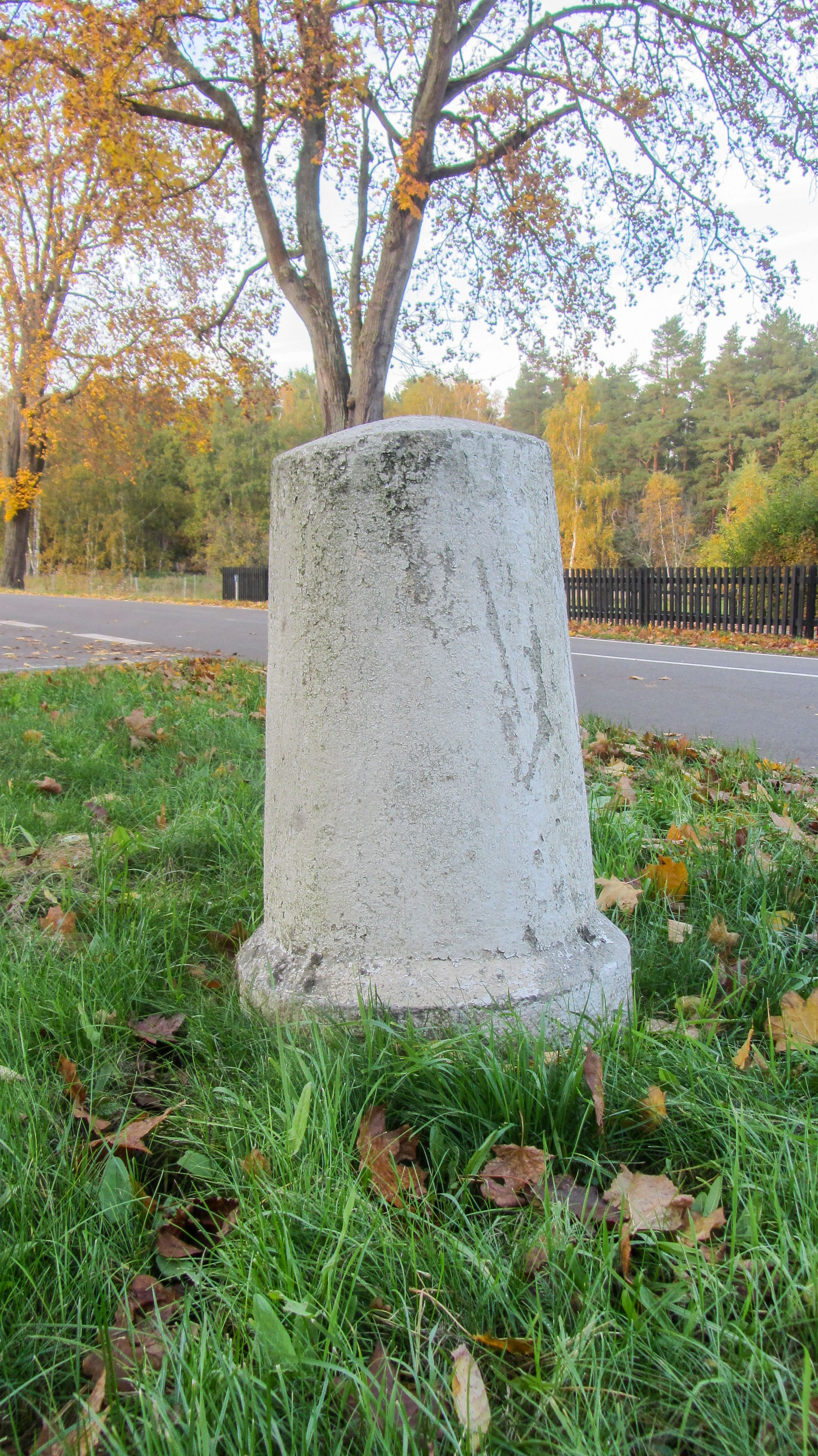 Preußischer Rundsockelstein (0215) in Losse OT Tannenkrug, an der B 190 Abzweig K 1014 in Richtung Losse-Lindenberg